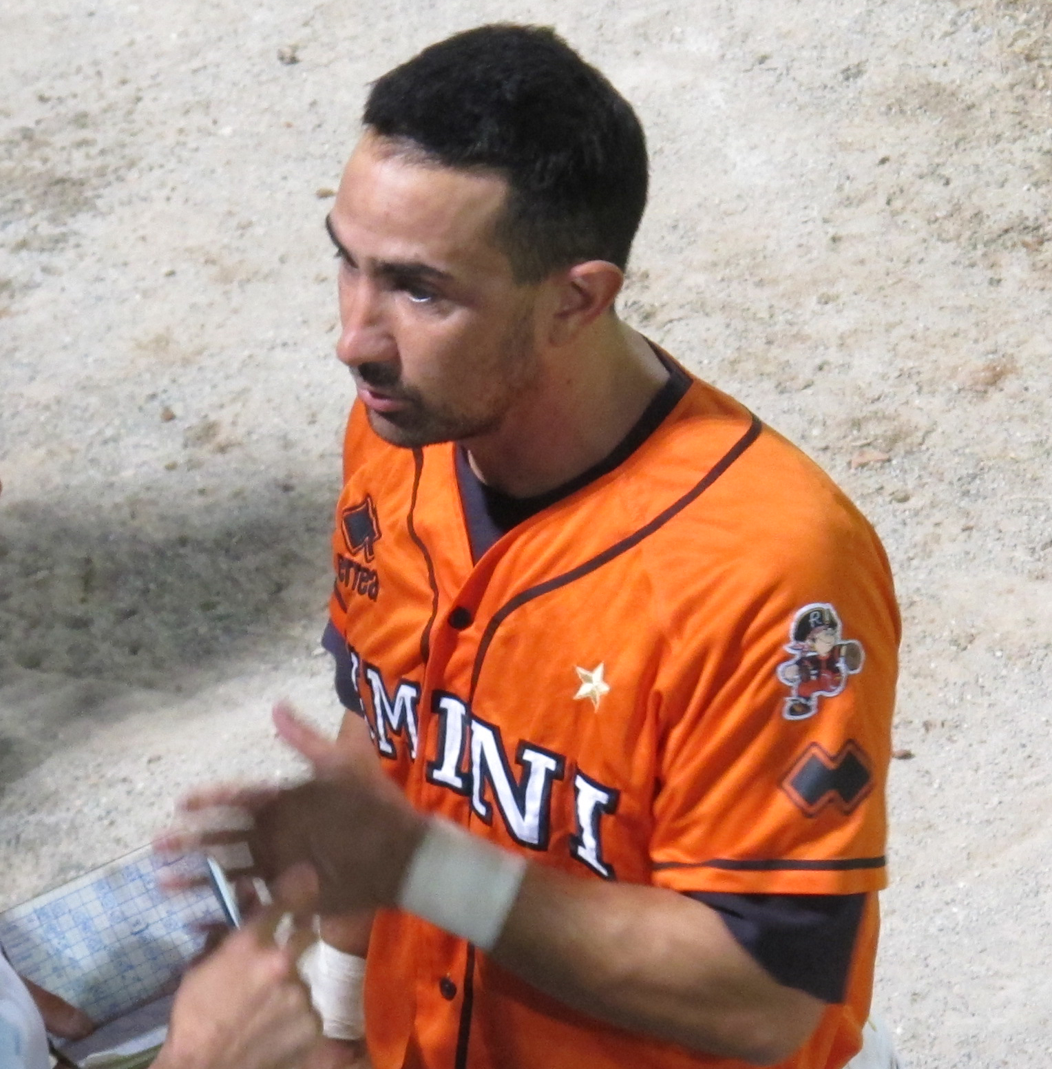 Jack Santora, interbase italo-americano in forza al Rimini Baseball, al termine di gara4 delle Italian Baseball Series, ovvero la serie finale che assegna lo scudetto italiano.